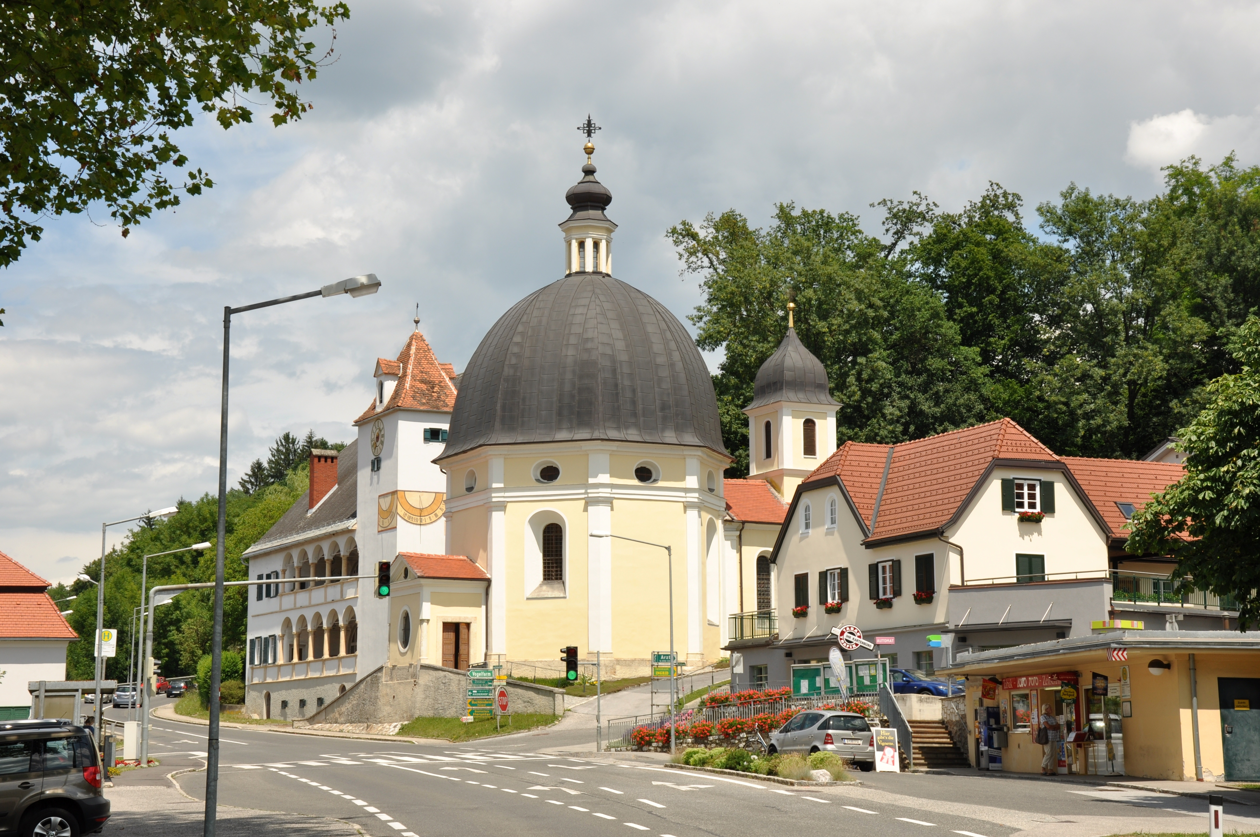 An der Kreuzung der Bundesstraße 70 (Packer Bundesstraße) mit der Haselsdorf- bzw. der Tobelbaderstraße in Tobelbad befinden sich die Kath. Pfarrkirche und der Pfarrhof.